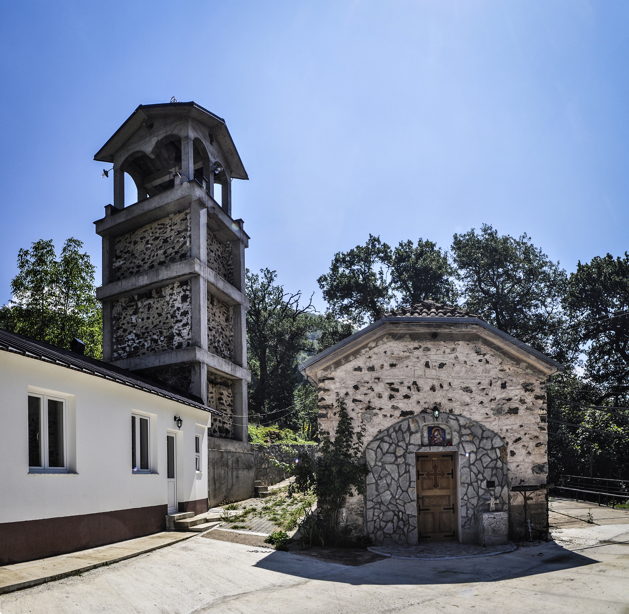 Црквата Света Богородица, Збажди 2016, Малесија, на планината Караорман